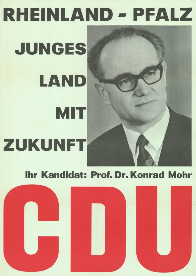 Rheinland-Pfalz Junges Land mit Zukunft Ihr Kandidat: Prof. Dr. Konrad Mohr CDU Abbildung: Porträtfoto Plakatart: Kandidaten-/Personenplakat mit Porträt Objekt-Signatur: 10-010 : 267 Bestand: Landtagswahlplakate Rheinland-Pfalz (10-010) GliederungBestand10-18: Landtagswahlplakate Rheinland-Pfalz (10-010) » CDU Lizenz: KAS/ACDP 10-010 : 267 CC-BY-SA 3.0 DE